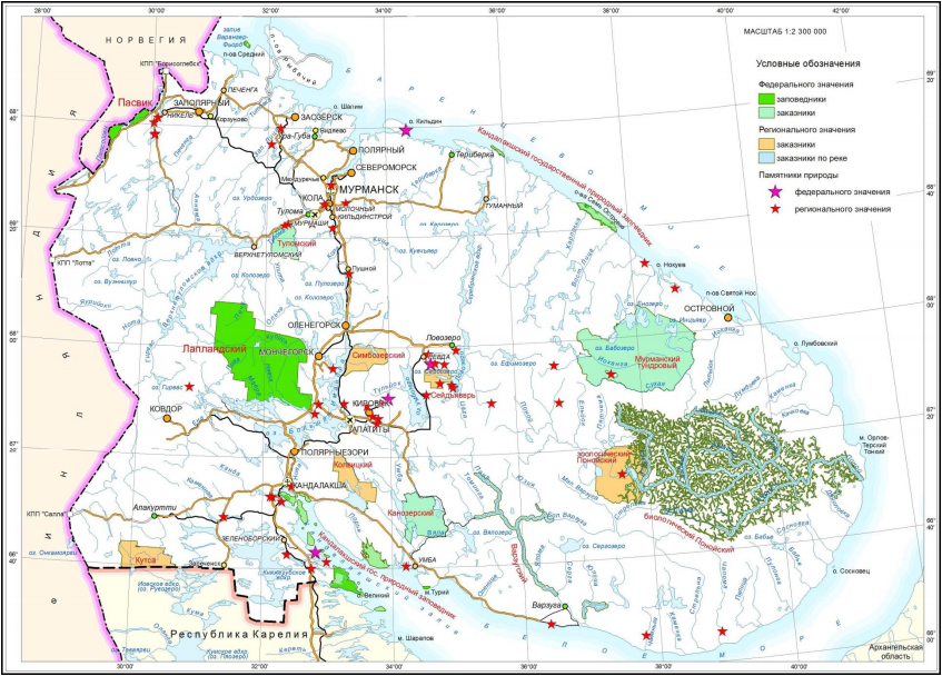 Схема размещения ООПТ Мурманской области по состоянию на 01.01.2011